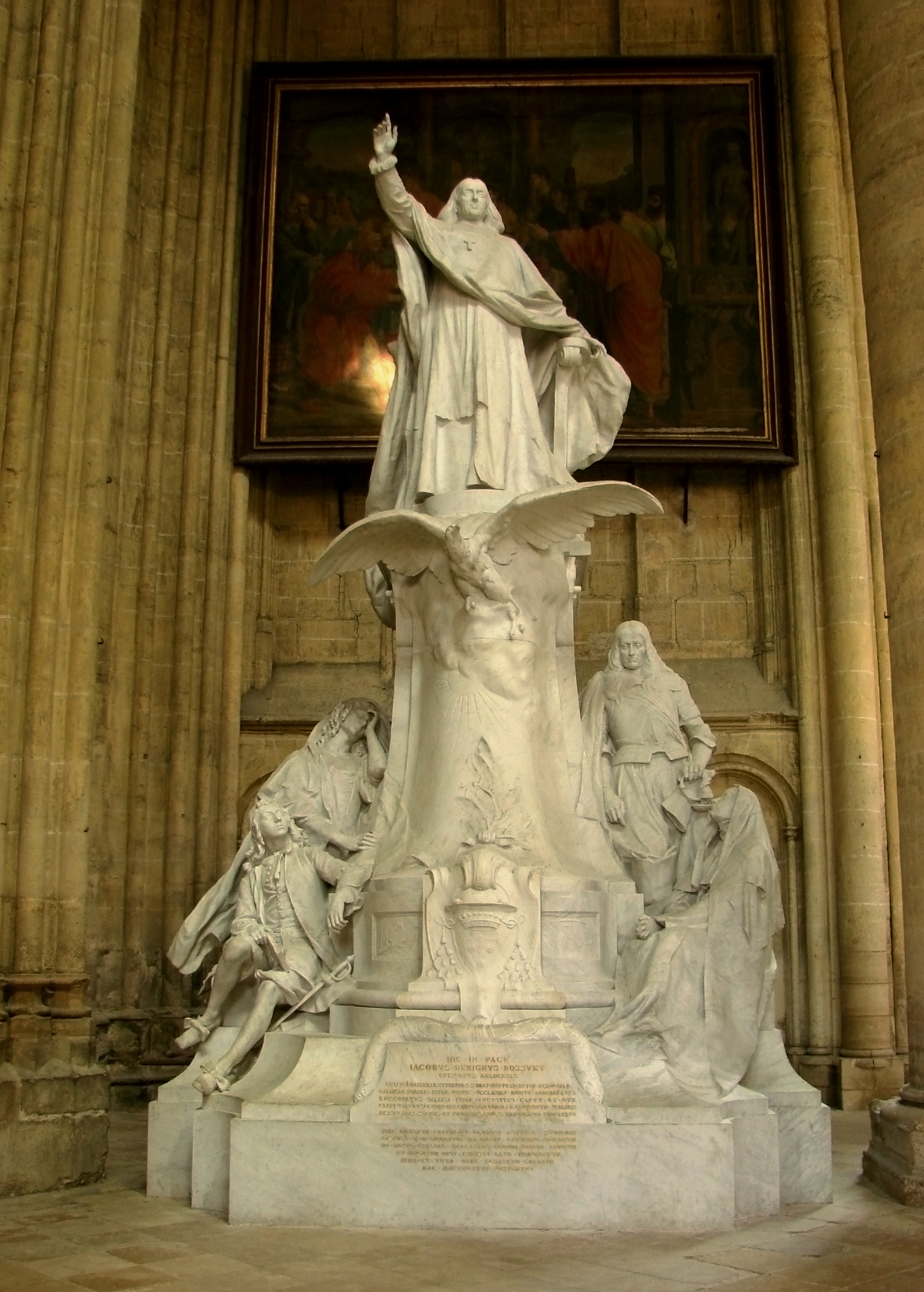 Le Grand Monument de Bossuet, oeuvre d'Ernest Henri Dubois (Dieppe 16/03/1863 - Paris 30/12/1930), placé dans la cathédrale de Meaux en 1911.